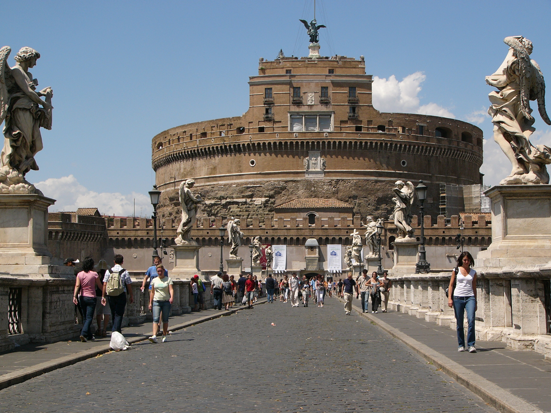 Engelenburcht (Castel Sant' Angelo) in Rome, met op de voorgrond de Engelenbrug